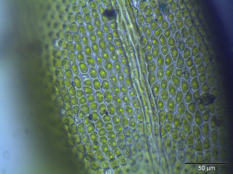 Haarspitzen-Thujamoos (Thuidium philibertii), Laminazellen, Vergrößerung: 400x